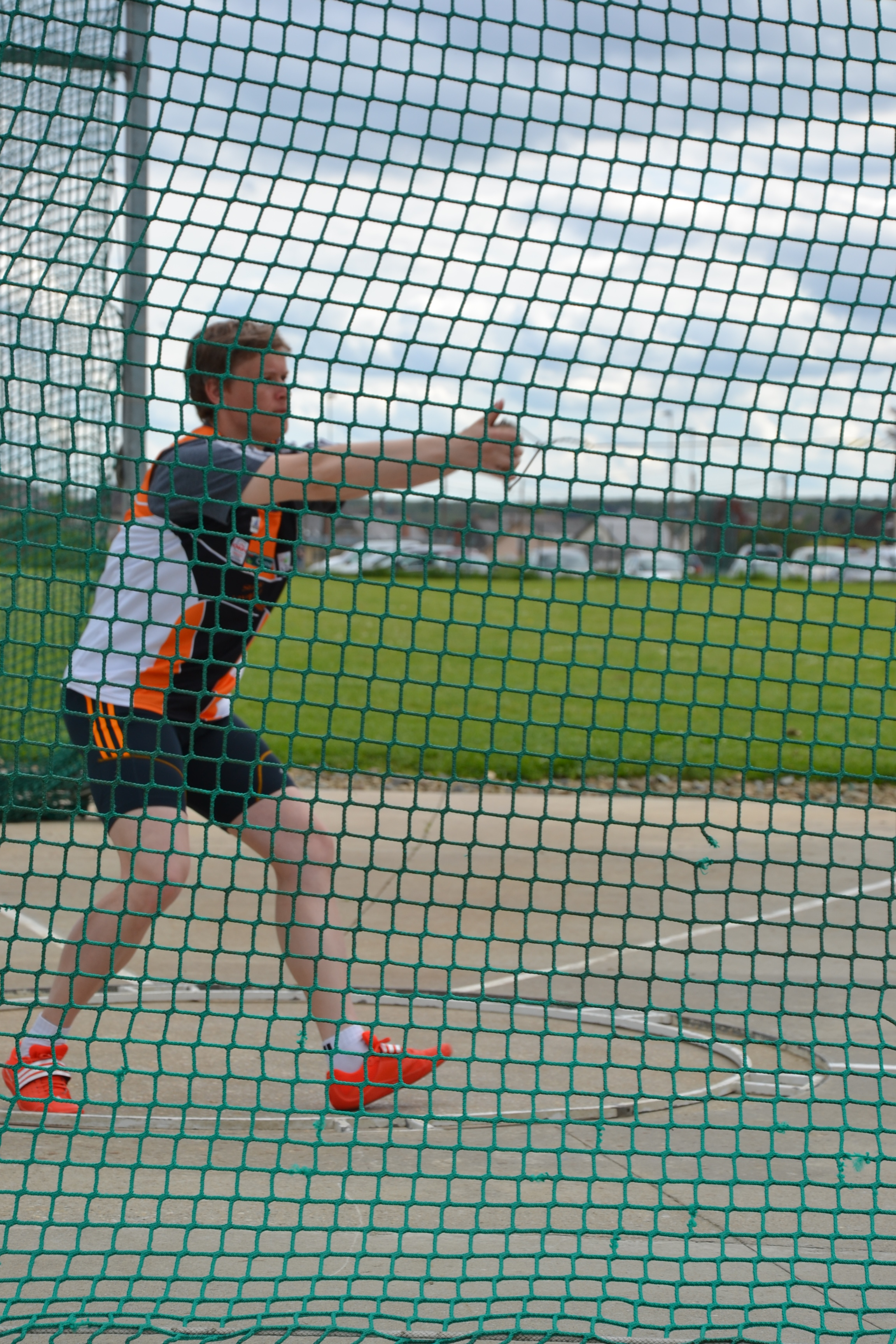 Manuela Montebrun au 1er tour des interclubs disputés à Laval le 5 mai 2013